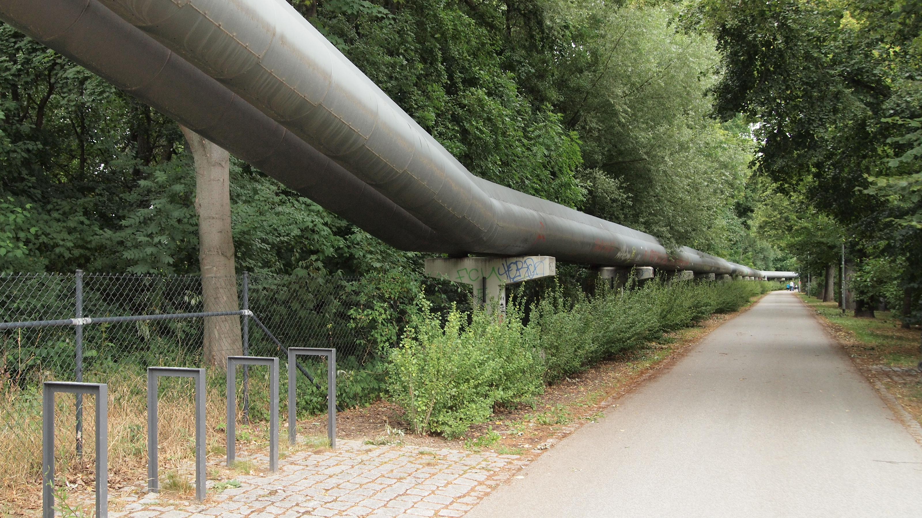 Fernheizleitung vom Heizkraftwerk Jena-Winzerla zum Stadtzentrum Jena, errichtet 1971/72, an der Rasenmühleninsel. Die Leitung verläuft auf dem verfüllten ehemaligen Mühlgraben der Rasenmühle.